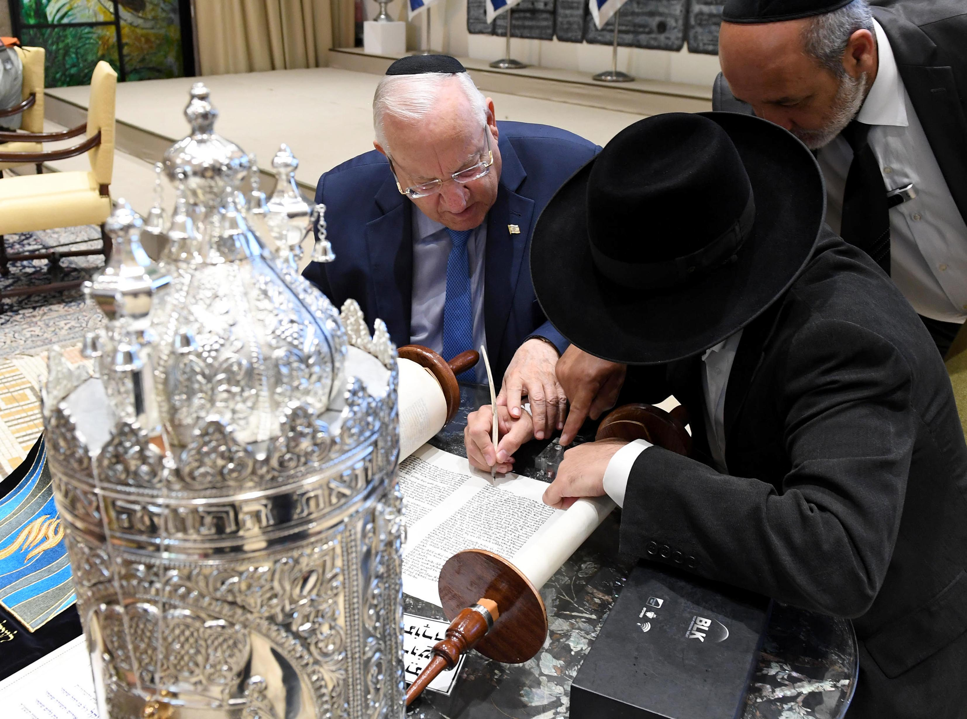 ראובן ריבלין נשיא מדינת ישראל השתתף בכתיבת אותיות ב'ספר הרעות' להנצחת גל-עד שער, נפתלי פרנקל ואיל יפרח שהתקיים בבית הנשיא. באירוע השתתפו הורי הנערים "בתמונה: ראובן ריבלין כותב אותיות ב"ספר הרעות